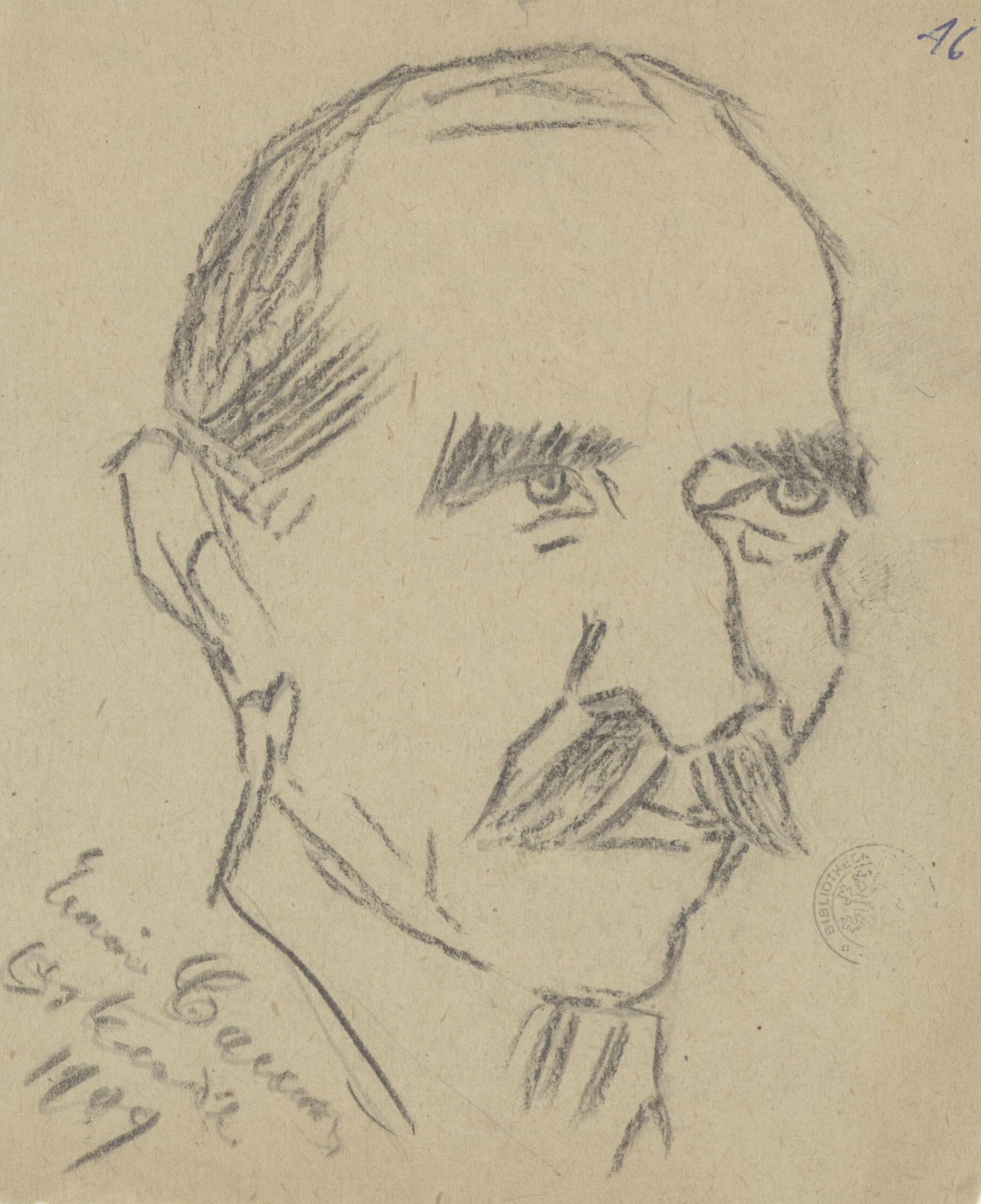 Meer dan waarschijnlijk portret van de Italiaanse muziekuitgever Edoardo Sonzogno (1836-1920) uit [verzamelband] karikaturen getekend door Enrico Caruso (1909, Universiteitsbibliotheek Gent)